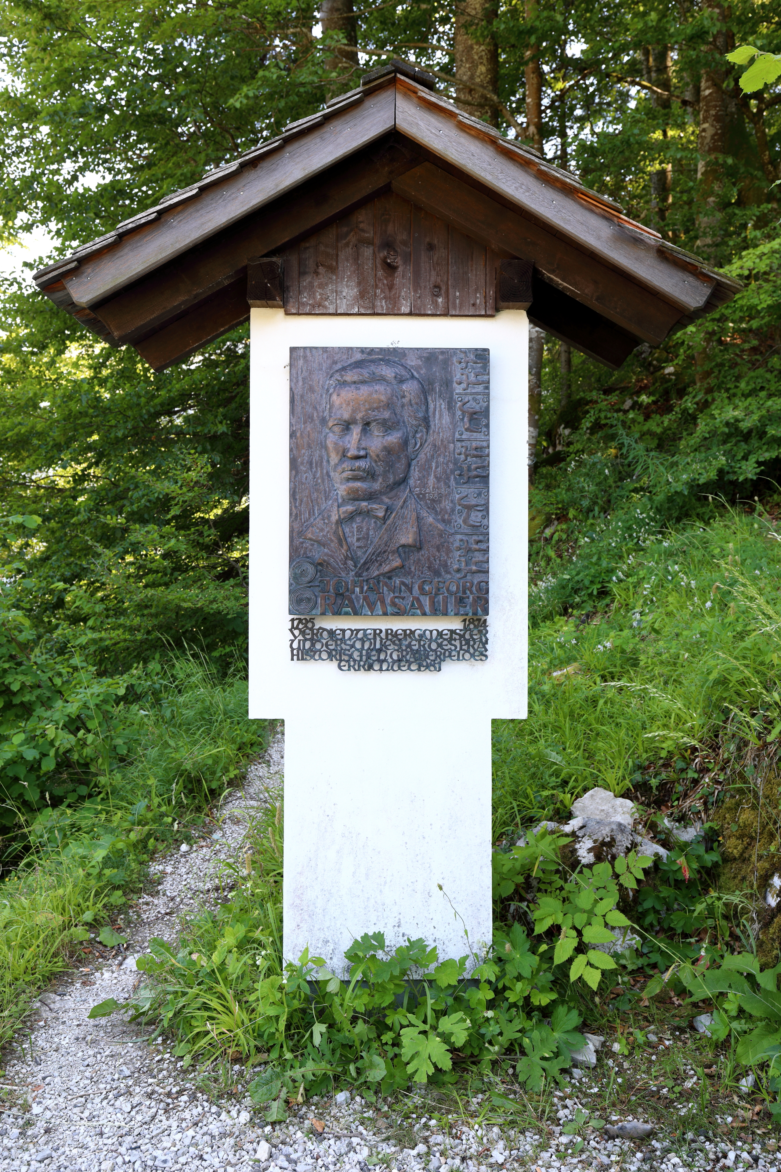 Das Ramsauer-Denkmal am Eingang des Salzbergtales bzw. nächst der Bergstation der Salzbergbahn in der oberösterreichischen Marktgemeinde Hallstatt. Das Denkmal schuf 1980/81 der Bildhauer Georg Zauner (1928-1995) und ist dem Entdeckers des Hallstätter Gräberfeldes, Johann Georg Ramsauer, gewidmet.